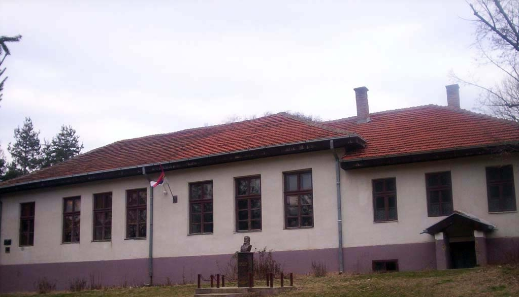 Основна школа "Карађорђе Петровић“, село Крушевица, општина Власотинце.